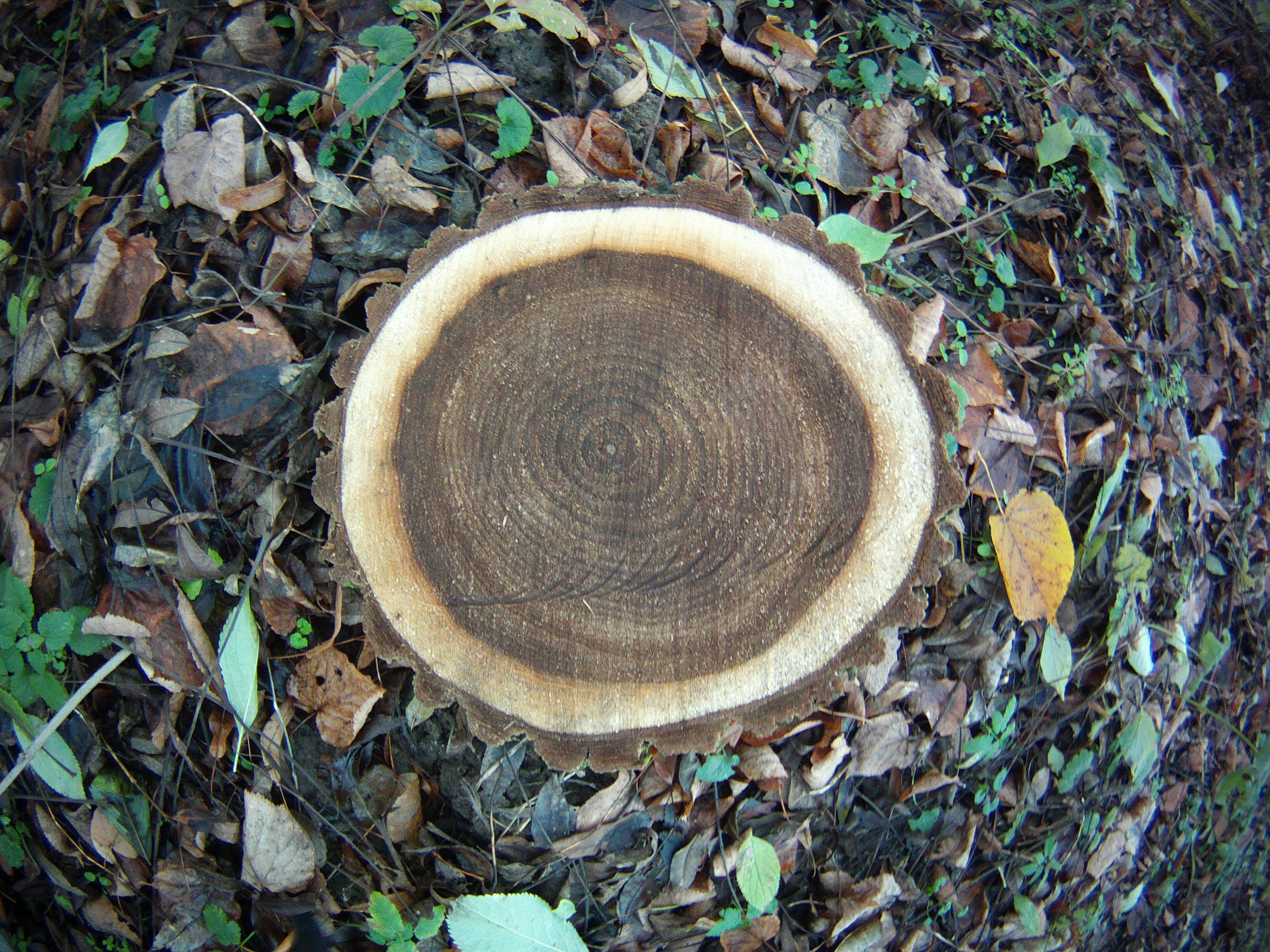 řez topolem černým